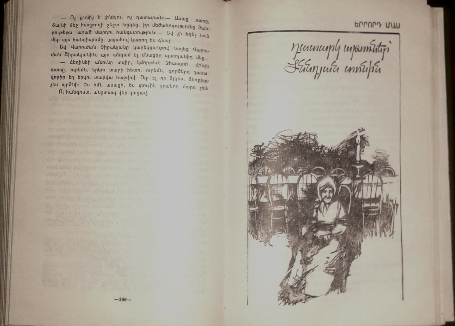 Կրակե շապիկ գրքի երրորդ մաս